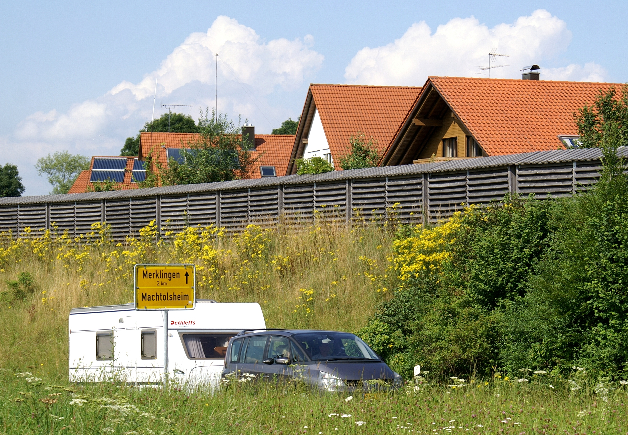 Lärmschutzwand aus nachwachsenden Rohstoffen; Rahmenbauweise aus Lärchenholz, aufgefüllt mit Strohballen. Diese 200 Quadratmeter große Lärmschutzwand steht in Machtolsheim auf der Schwäbischen Alb und schützt seit 2004 ein Wohngebiet vor dem Lärm einer Ortsumgehungsstraße.